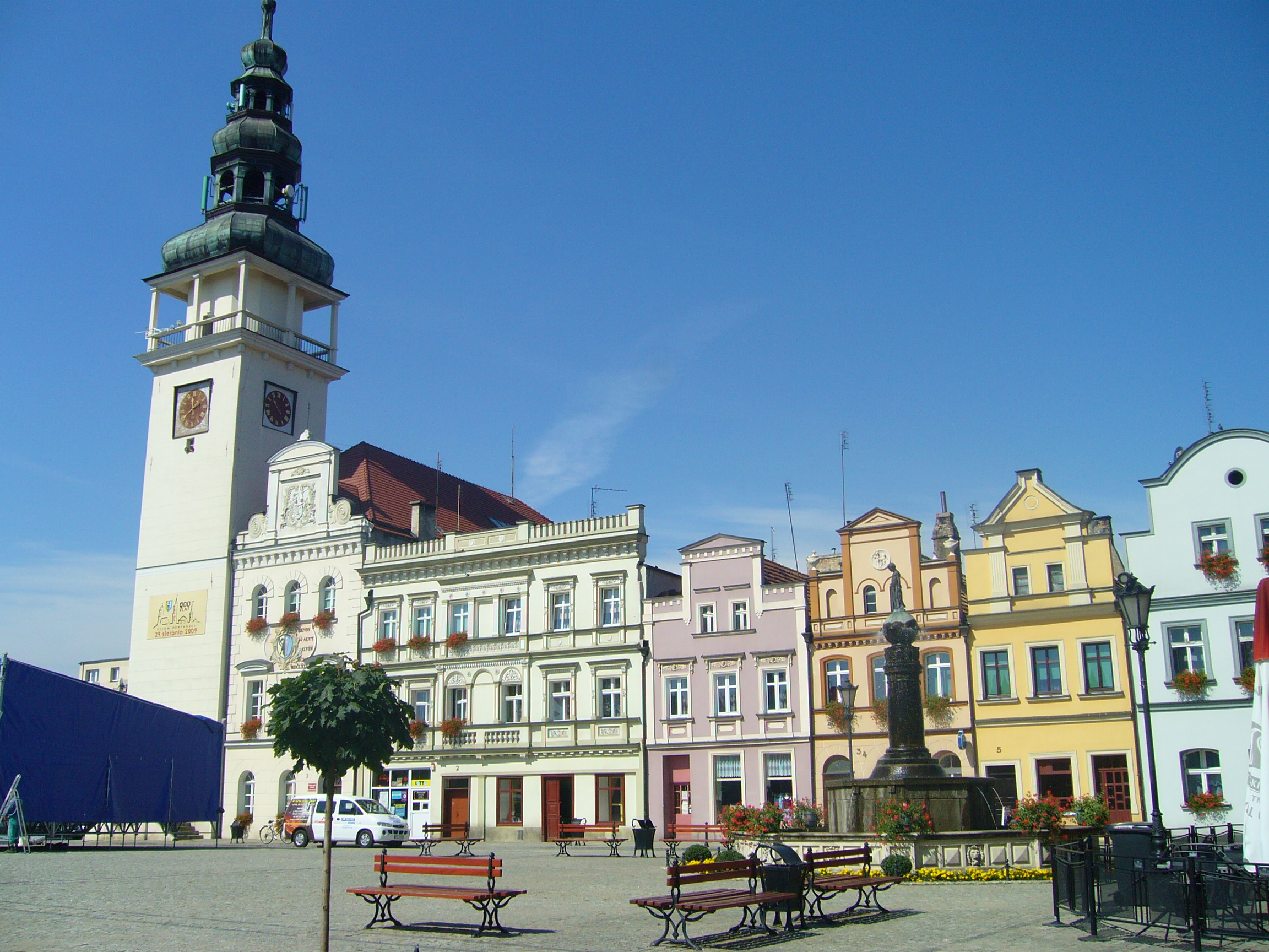 Ratusz